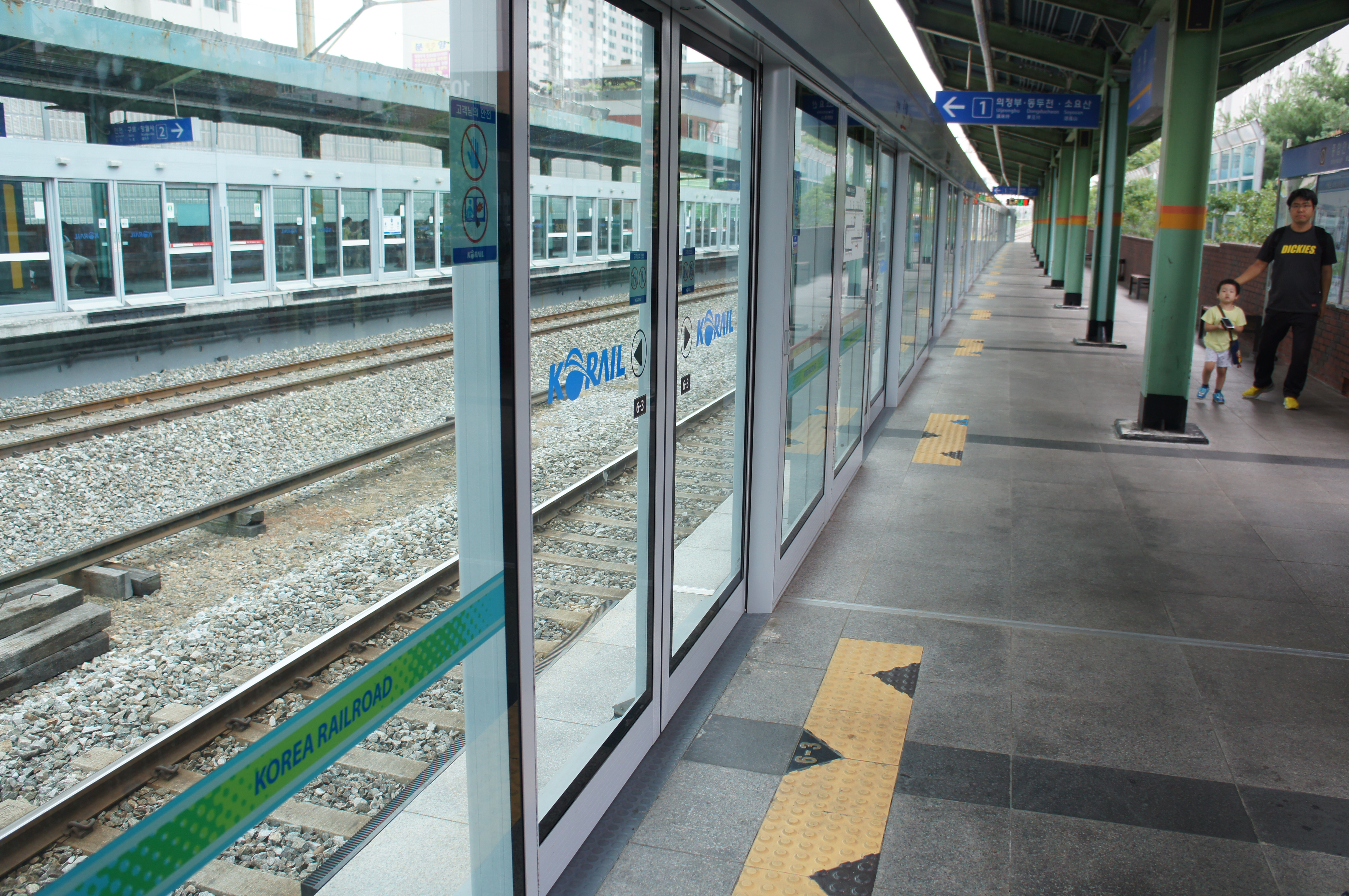 회룡역 승강장 (망월사역 방면)